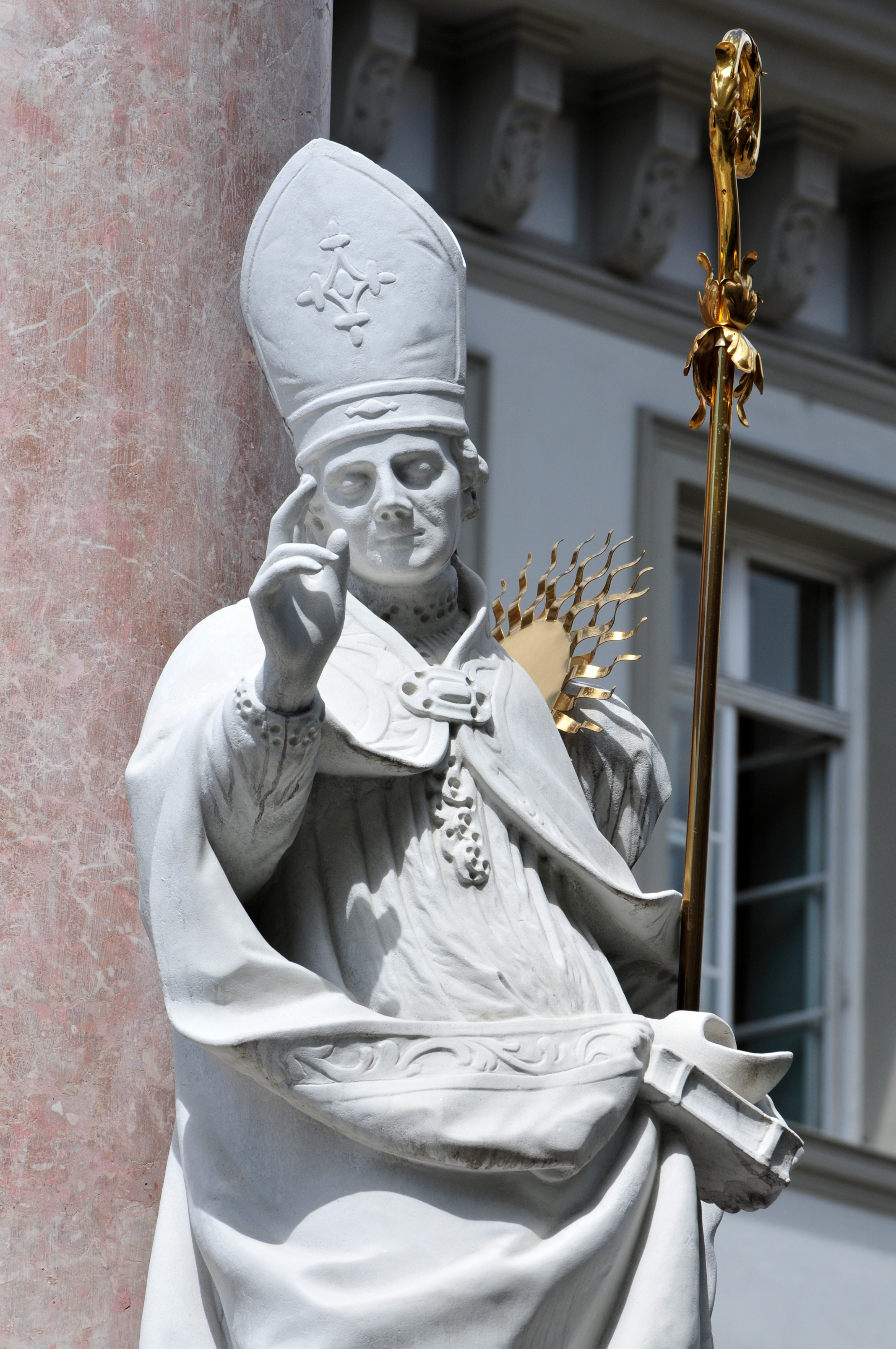 Annasäule Innsbruck Im Rahmen des Fußballländerspiels Österreich gegen Rumänien bin ich einige Stunden durch Innsbruck gefahren und habe Aufnahmen gemacht, die vielleicht mal gebraucht werden könnten. --Ralf Roleček 11:20, 10 June 2012 (UTC) The making of this work was supported by Wikimedia Austria. For other files made with the support of Wikimedia Austria, please see the category Supported by Wikimedia Österreich.